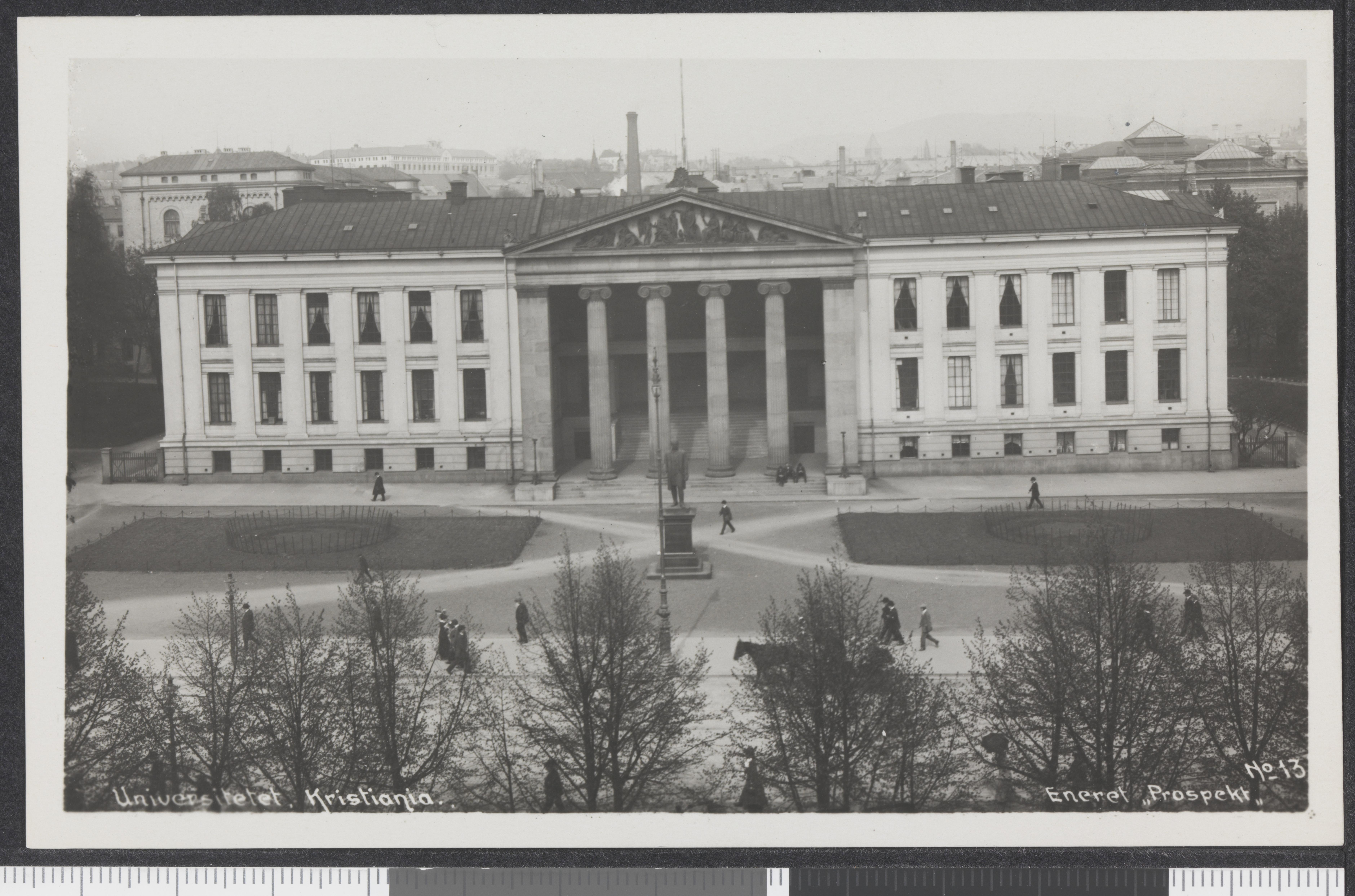 Bildet er hentet fra Nasjonalbibliotekets bildesamling Universitetsbygningene ved Karl Johan, Oslo, Oslo